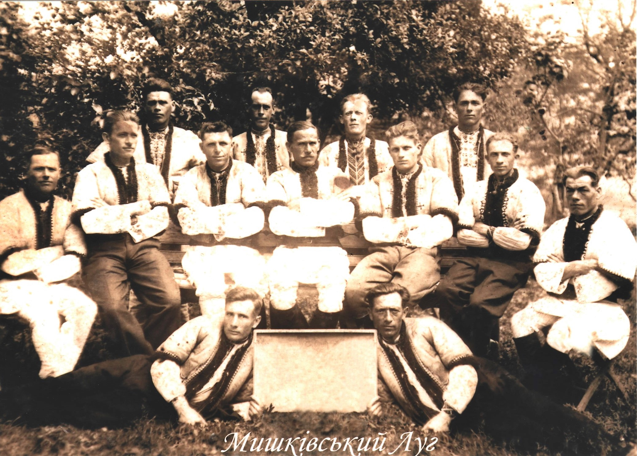 Товариство "Луг" у с. Мишків в 30-х роках ХХ століття